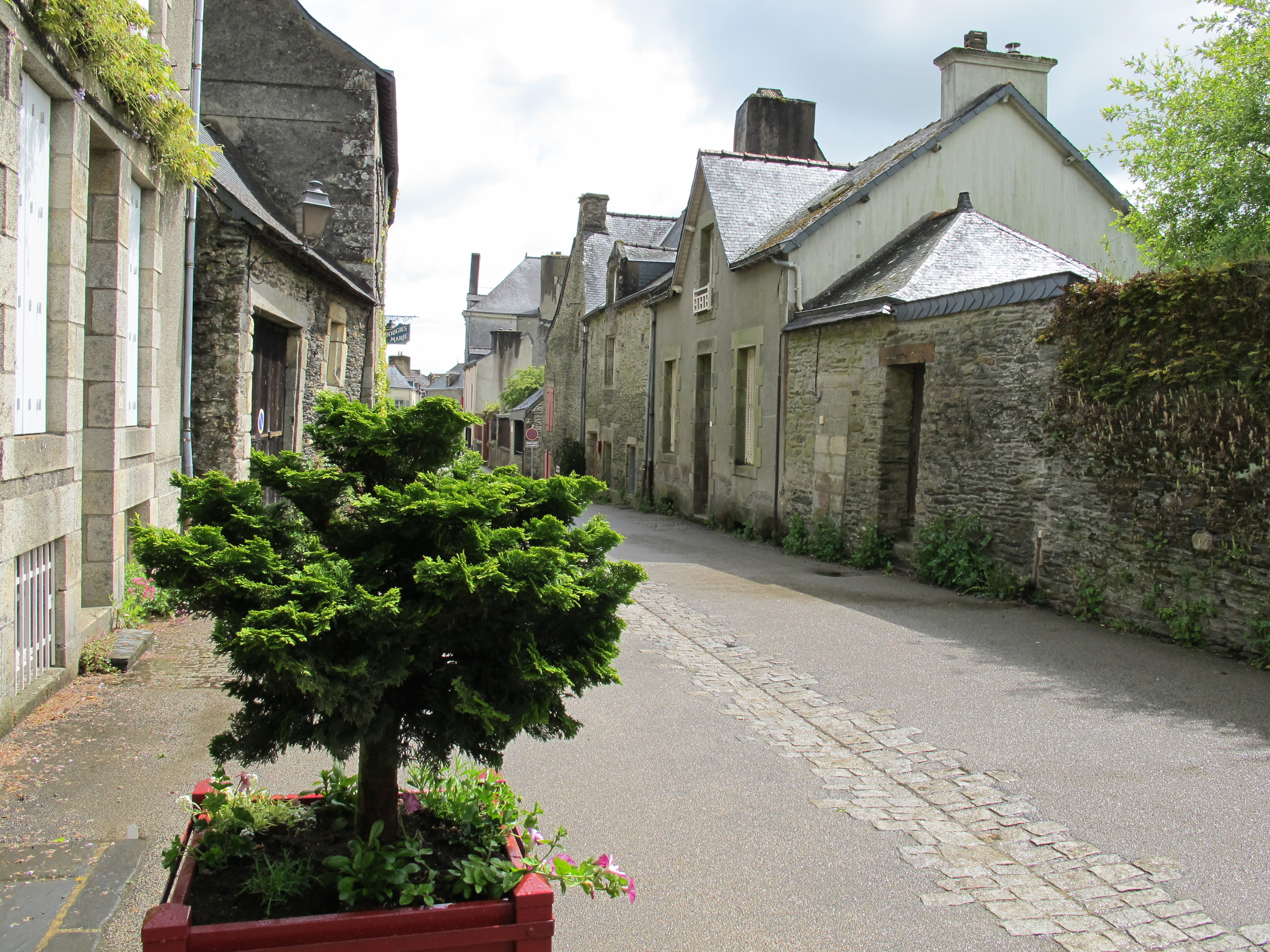 Rochefort-en-Terre